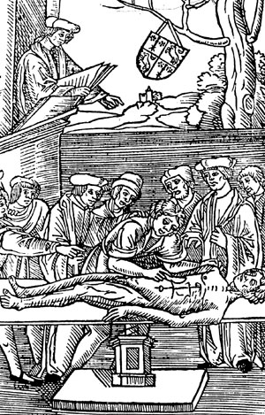 Estampe représentant un théâtre anatomique temporaire dans l'Anatomie de Mondin, parue à Paris chez A. Lotrian et D. Janot en 1532.